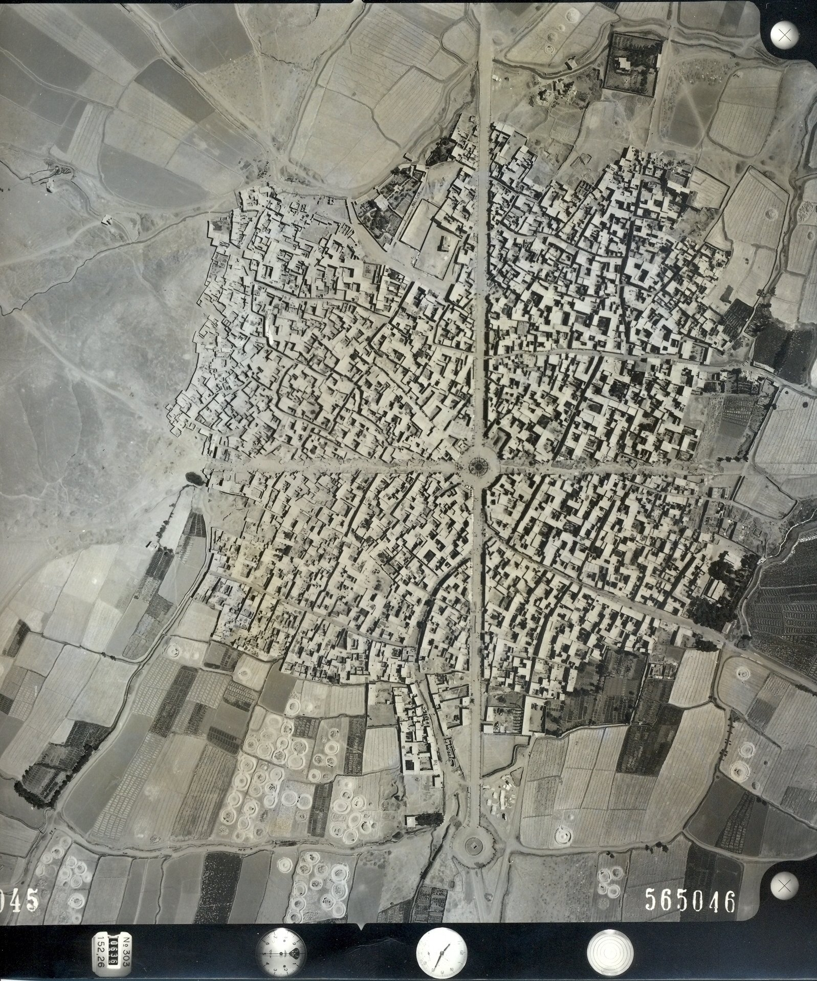 تۆرکجه: سونقور هوایی شکیلی 1328 جی ایل ده